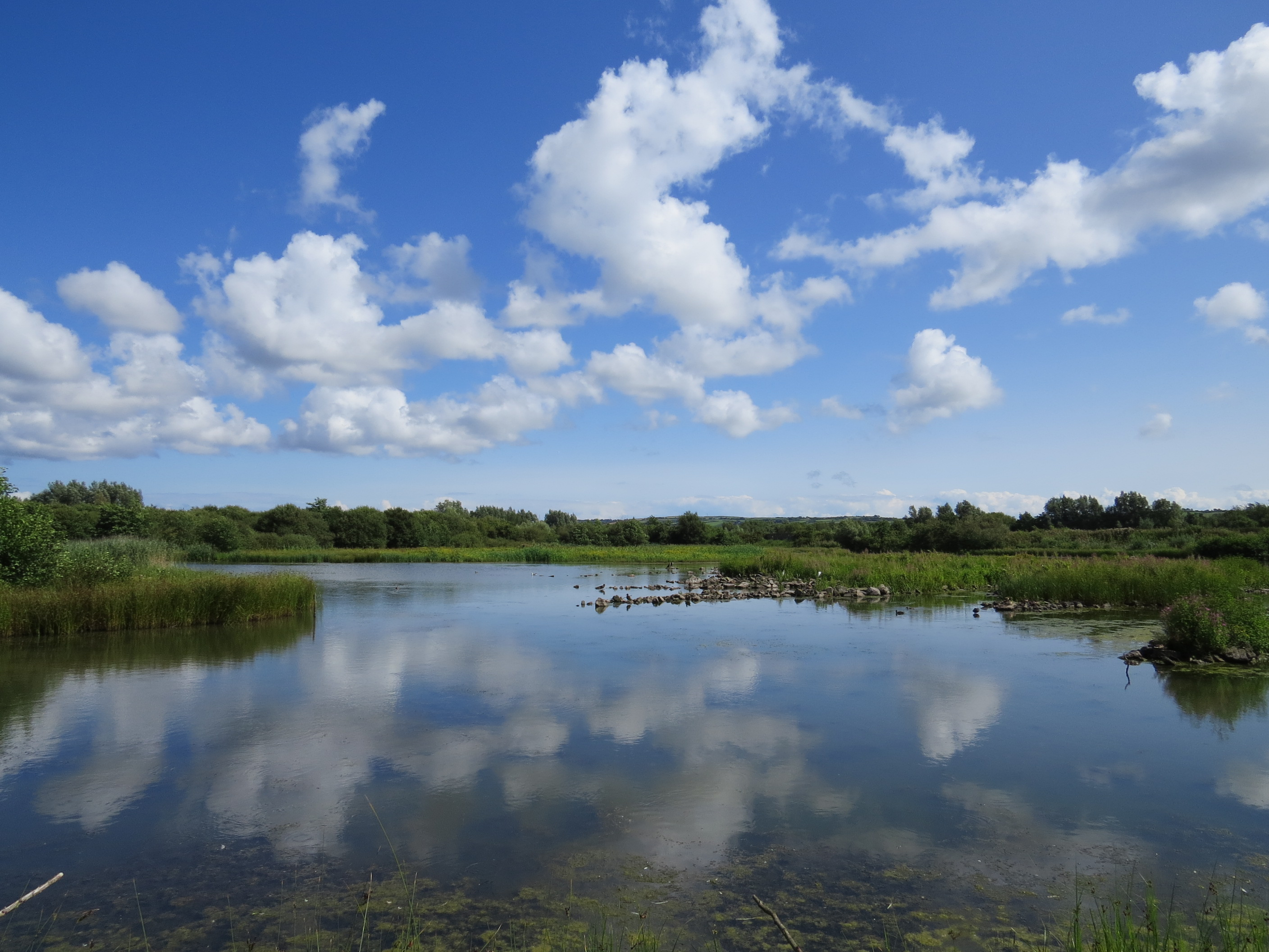 Canolfan Gwlyptir WWT Llanelli